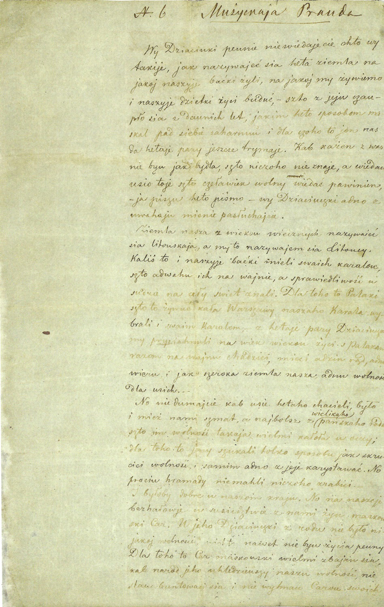 Беларуская (тарашкевіца): Рукапіс Мужыцкай праўды №6. Старонка 1 з тэкстам: Вы, дзецюкі, пэўне ня ведаеце, хто вы такія, як называецца гэта зямля, на якой нашы бацькі жылі Зямля наша зь вякоў вечных называецца літоўская, а мы то называемся літоўцы.